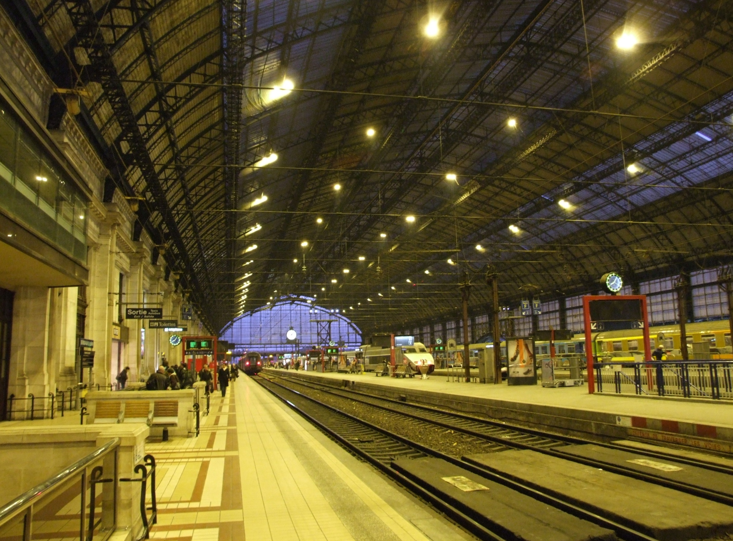 Gare Saint-Jean, Bordeaux, Gironde, FRANCE